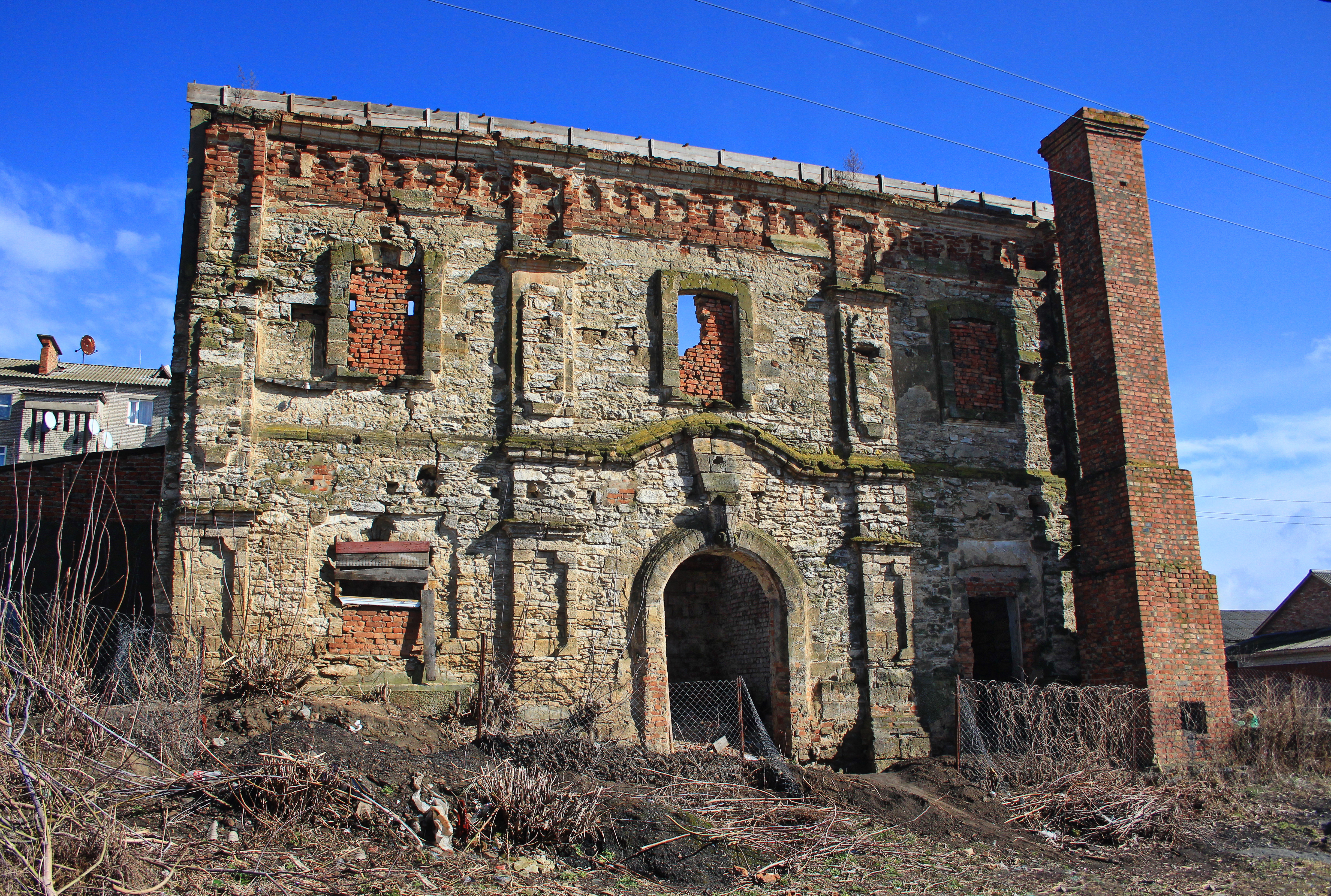 Синагога, смт Чечельник, Чечельницький район Вінницька область